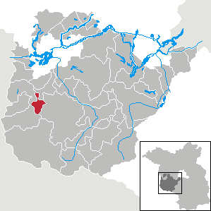 Gräben in Brandenburg (Country) - District Potsdam-Mittelmark